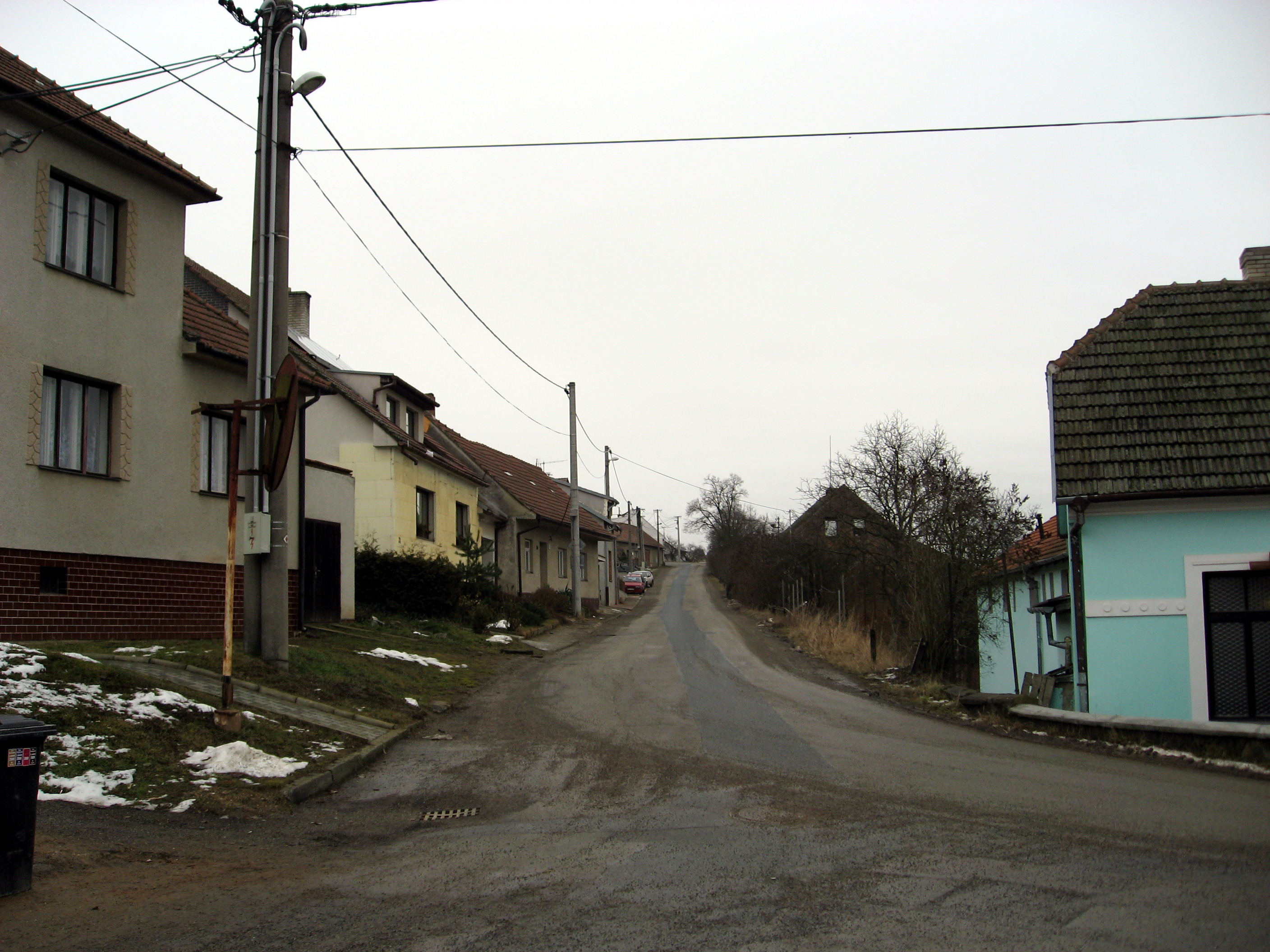 Rozdrojovice